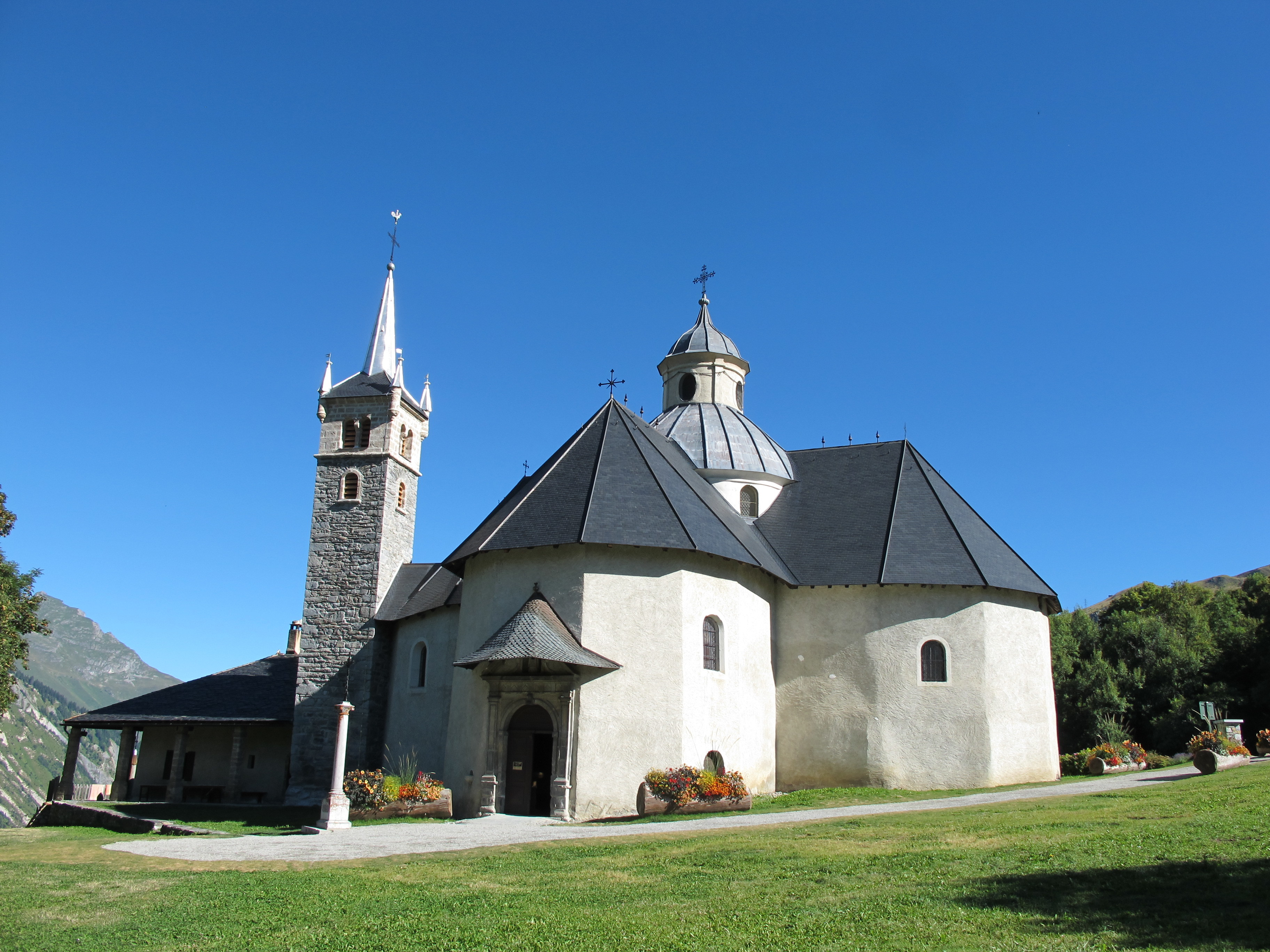 Église Notre-Dame-de-la-Vie, Saint Martin de Belleville